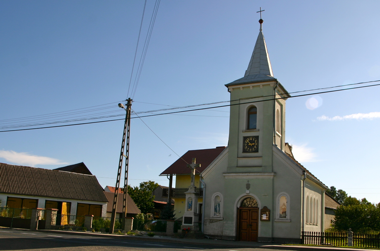 Zwiastowice (dodatkowa nazwa w j. niem. Schwesterwitz) – wieś w Polsce położona w województwie opolskim, w powiecie prudnickim, w gminie Głogówek. Kaplica pw. NMP (dec. kościół fil.) (nr 16), 1853. Nawiązuje swoim stylem do późnego klasycyzmu.